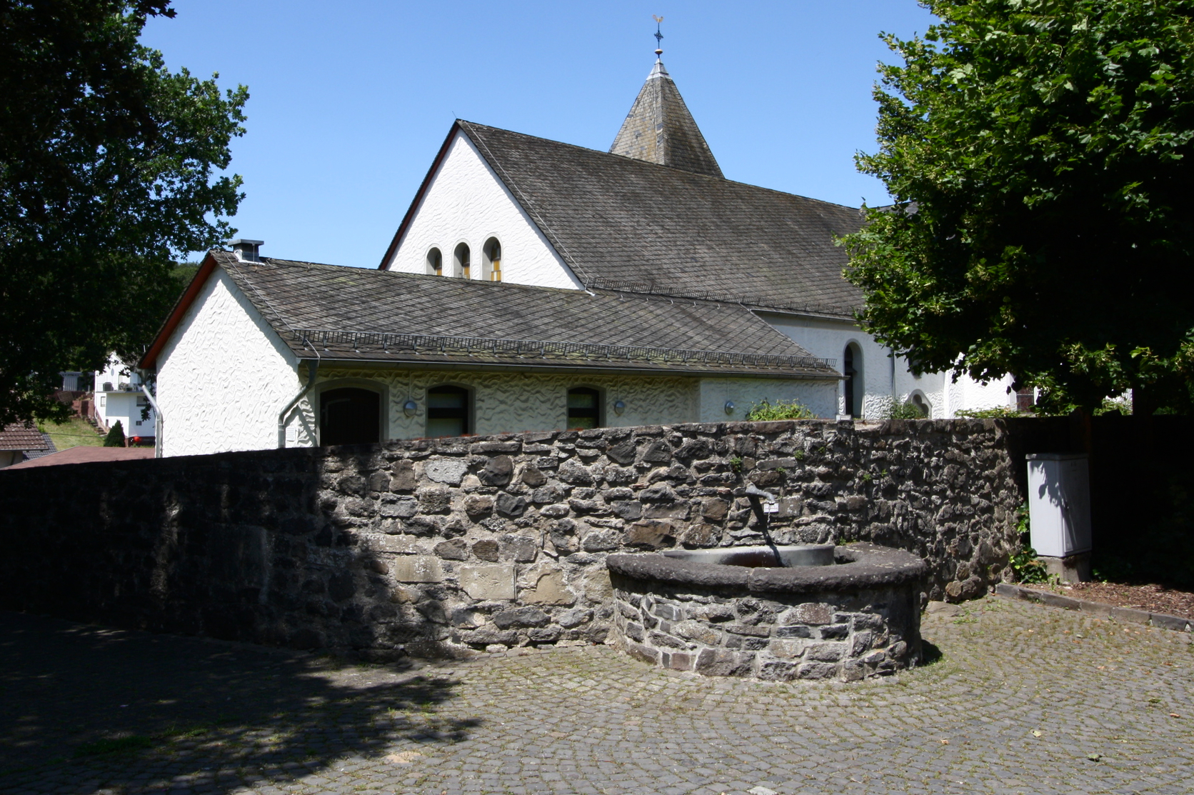 St. Kilian, Kirche in Nomborn, Westerwald, Rheinland-Pfalz, Deutschland